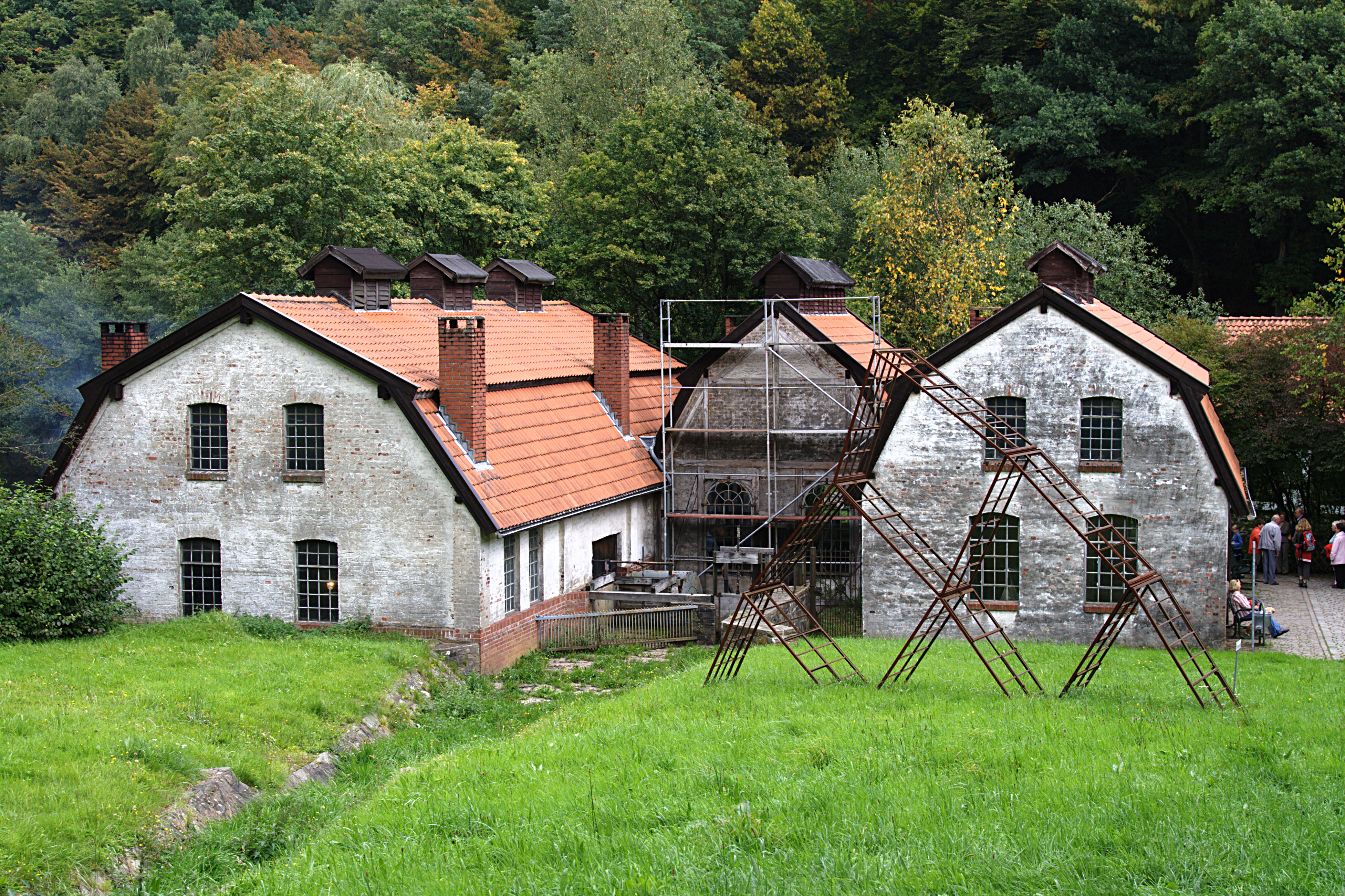 Westfälisches Freilichtmuseum Hagen, Gebäude Sensenhammer